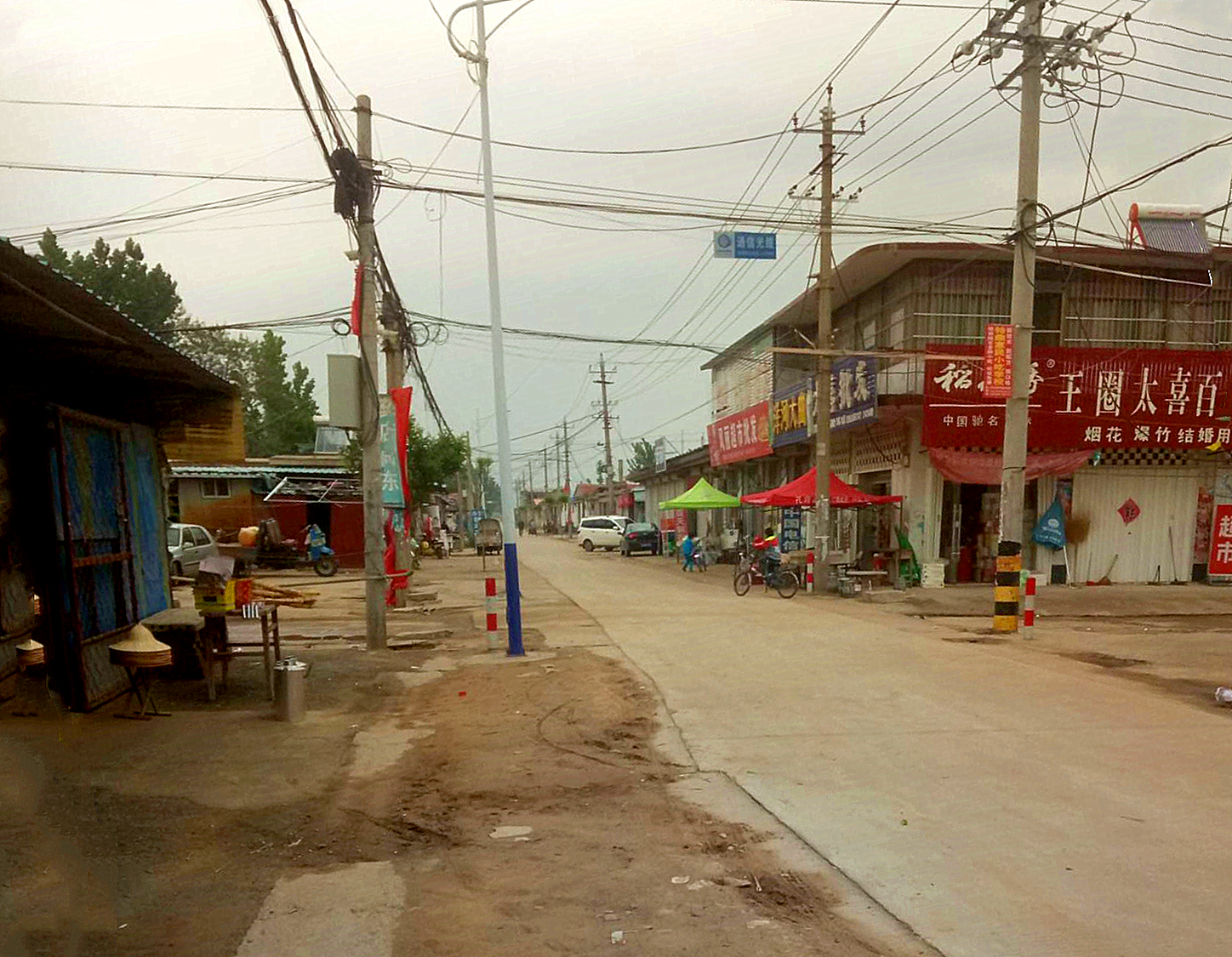 中文（中国大陆）: 彭集镇王圈村